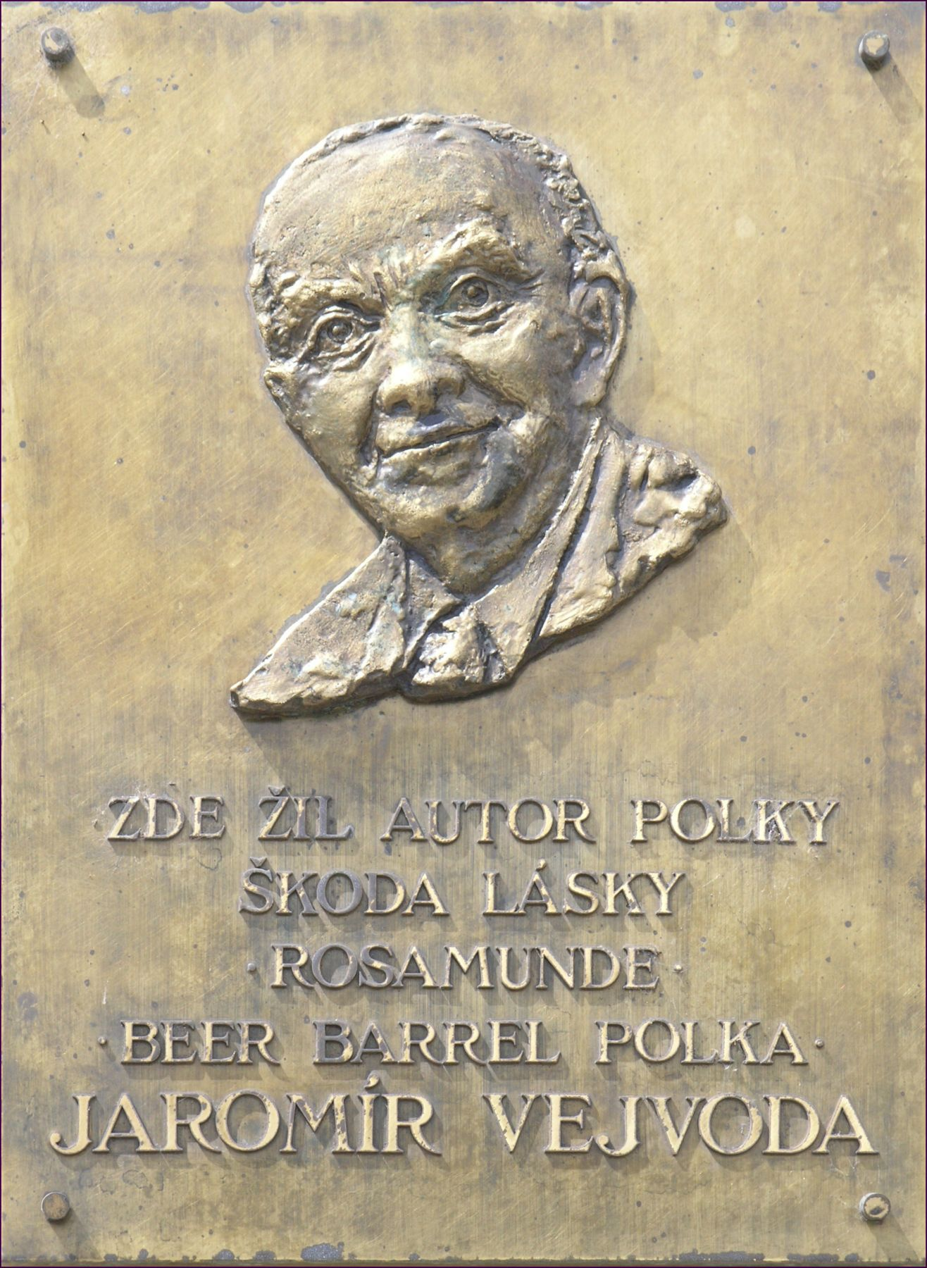 Praha, Zbraslav, Zbraslavské náměstí čp. 453, restaurace Škoda lásky - pamětní deska Jaromíra Vejvody